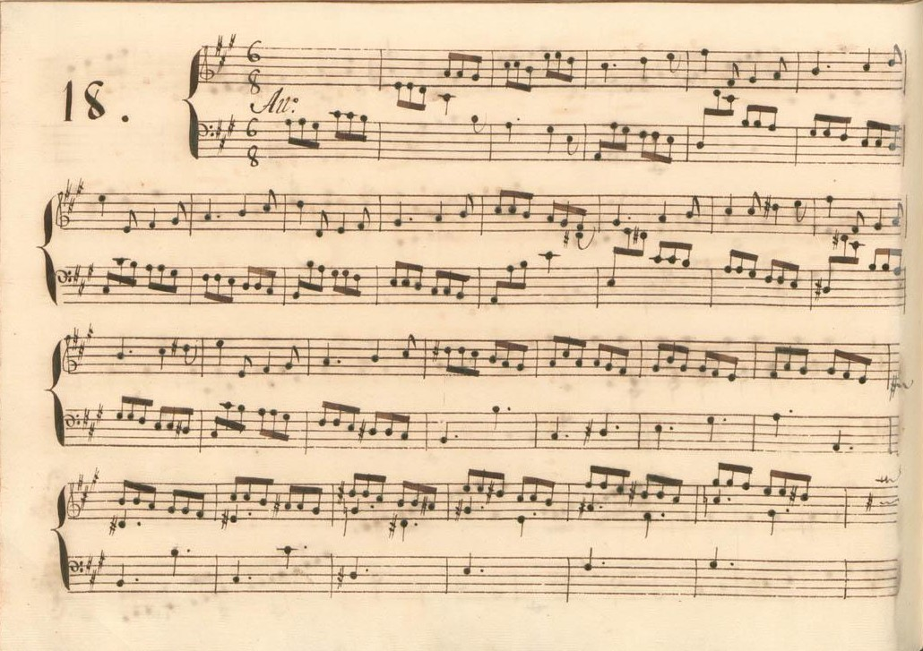 La sonate K. 405, telle qu'elle se présente dans le manuscrit de Venise, volume III no. 24.